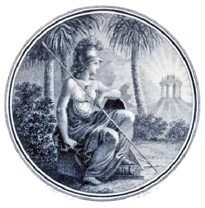 Vignette der Leipziger Freimaurerloge Minerva zu den drei Palmen, nach einem Entwurf von Julius Schnorr von Carolsfeld